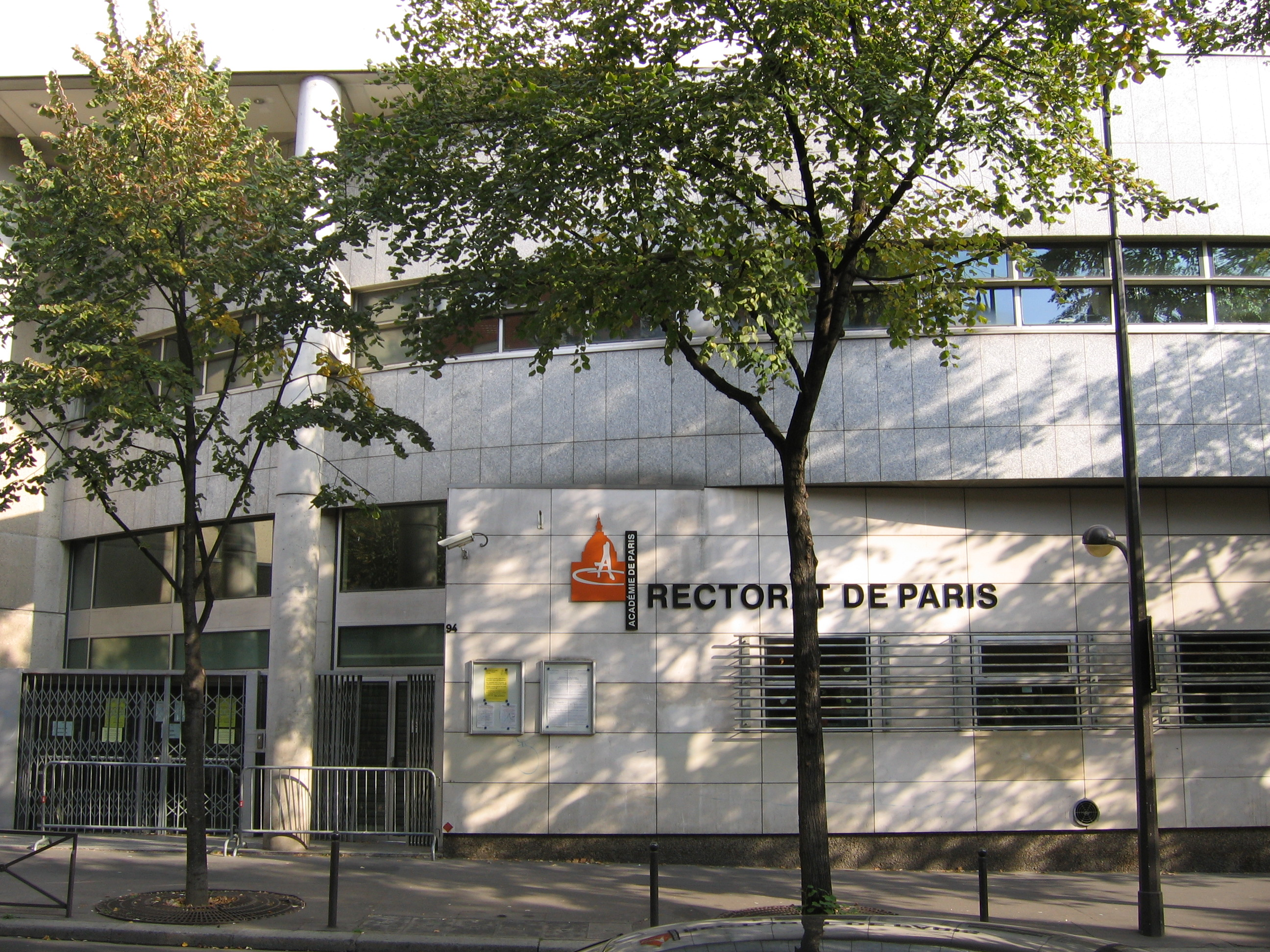 Rectorat de Paris, 94 avenue Gambetta